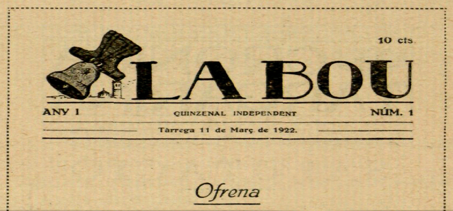 La Bou, quinzenal independent de Tarrega, publicava el primer número l'11 de Març de 1922.